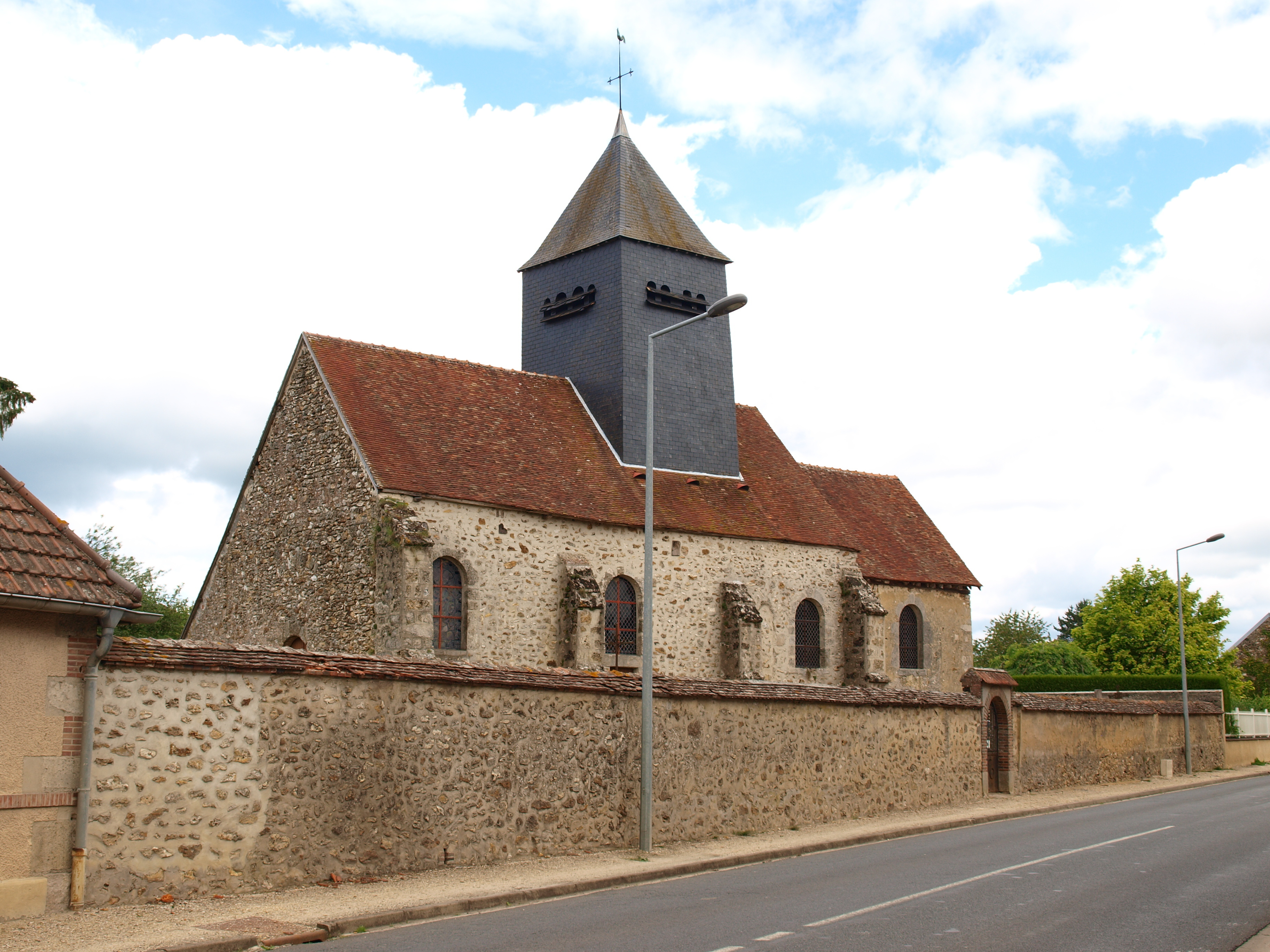 La Caure (Marne, France) ; église Saint-Pierre-ès-liens